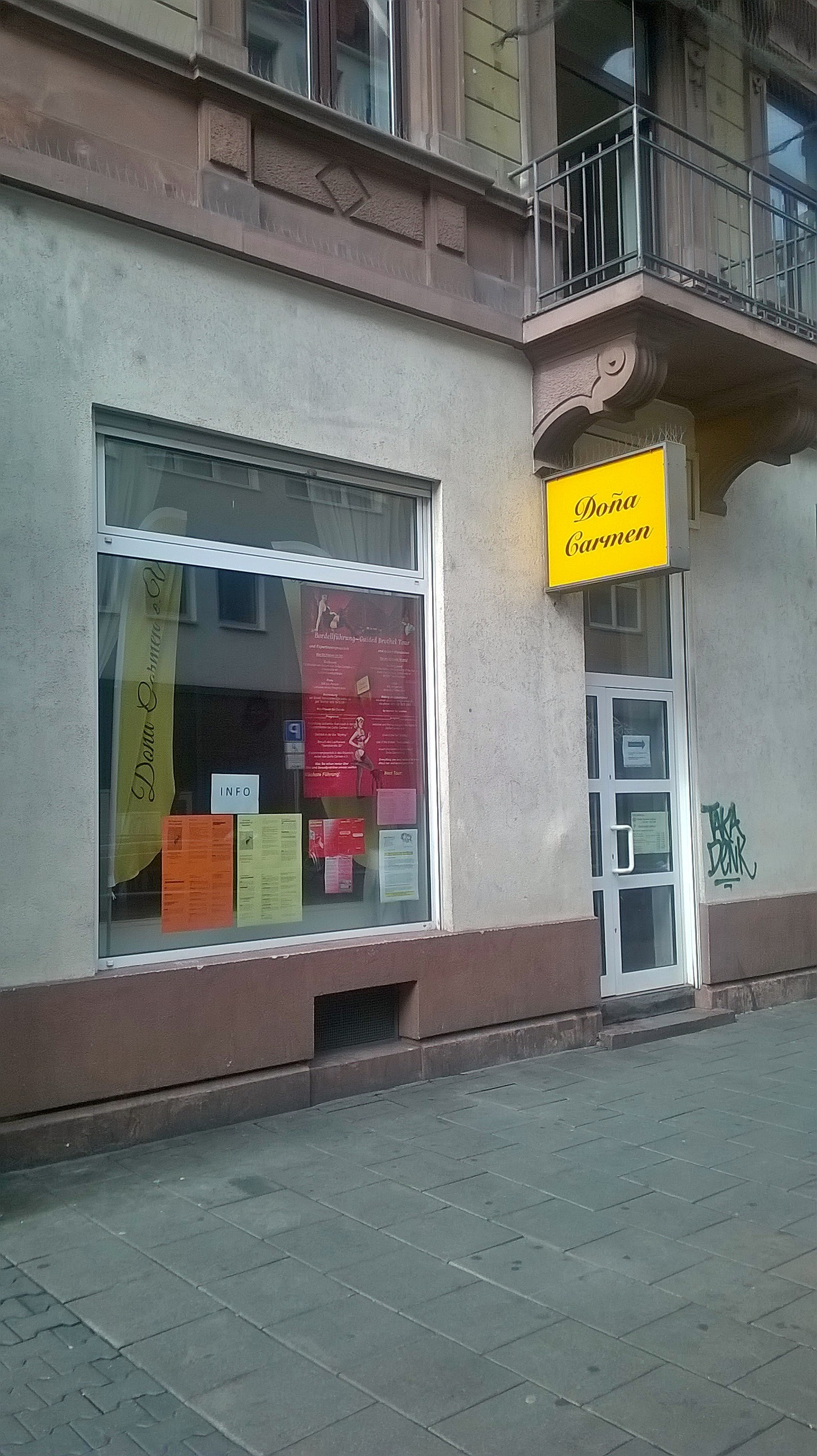 Geschäftsräume des Vereins Doña Carmen im Bahnhofsviertel von Frankfurt am Main